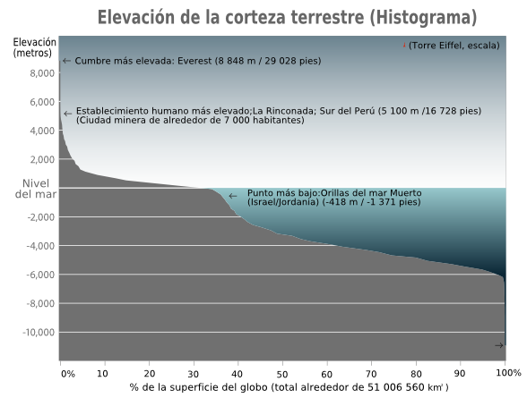 faite sur l'image (légende, échelles...)